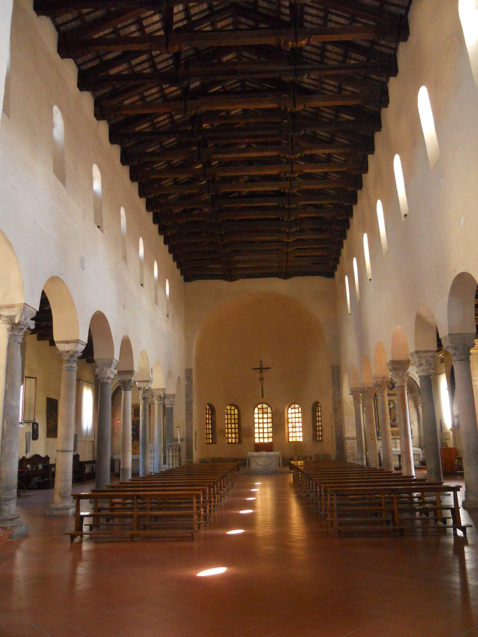 L'interno a tre navate della basilica di Sant'Agata Maggiore in Ravenna.